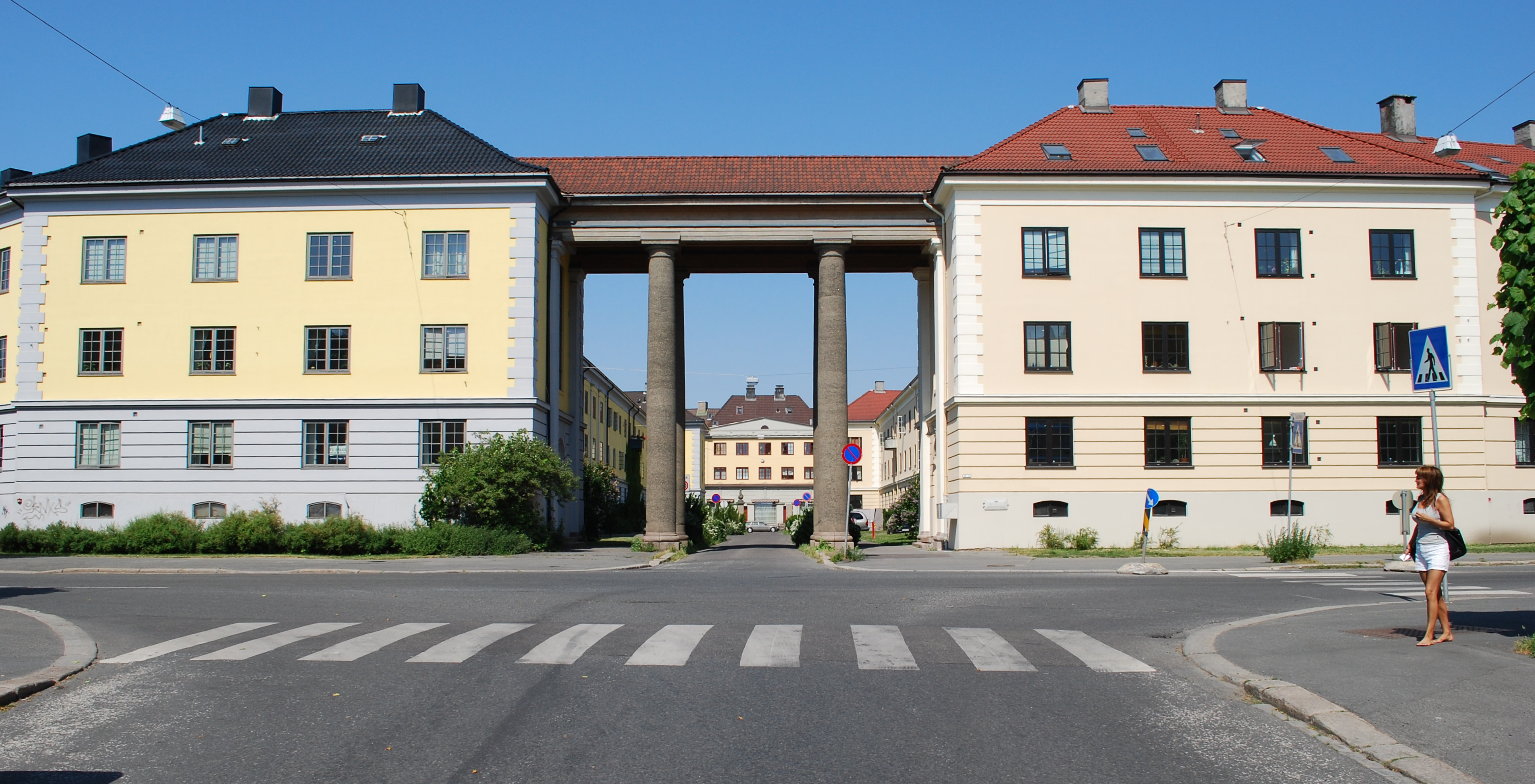 Hans Nielsens Hauges gate 32-34, Nordre Åsen, Oslo